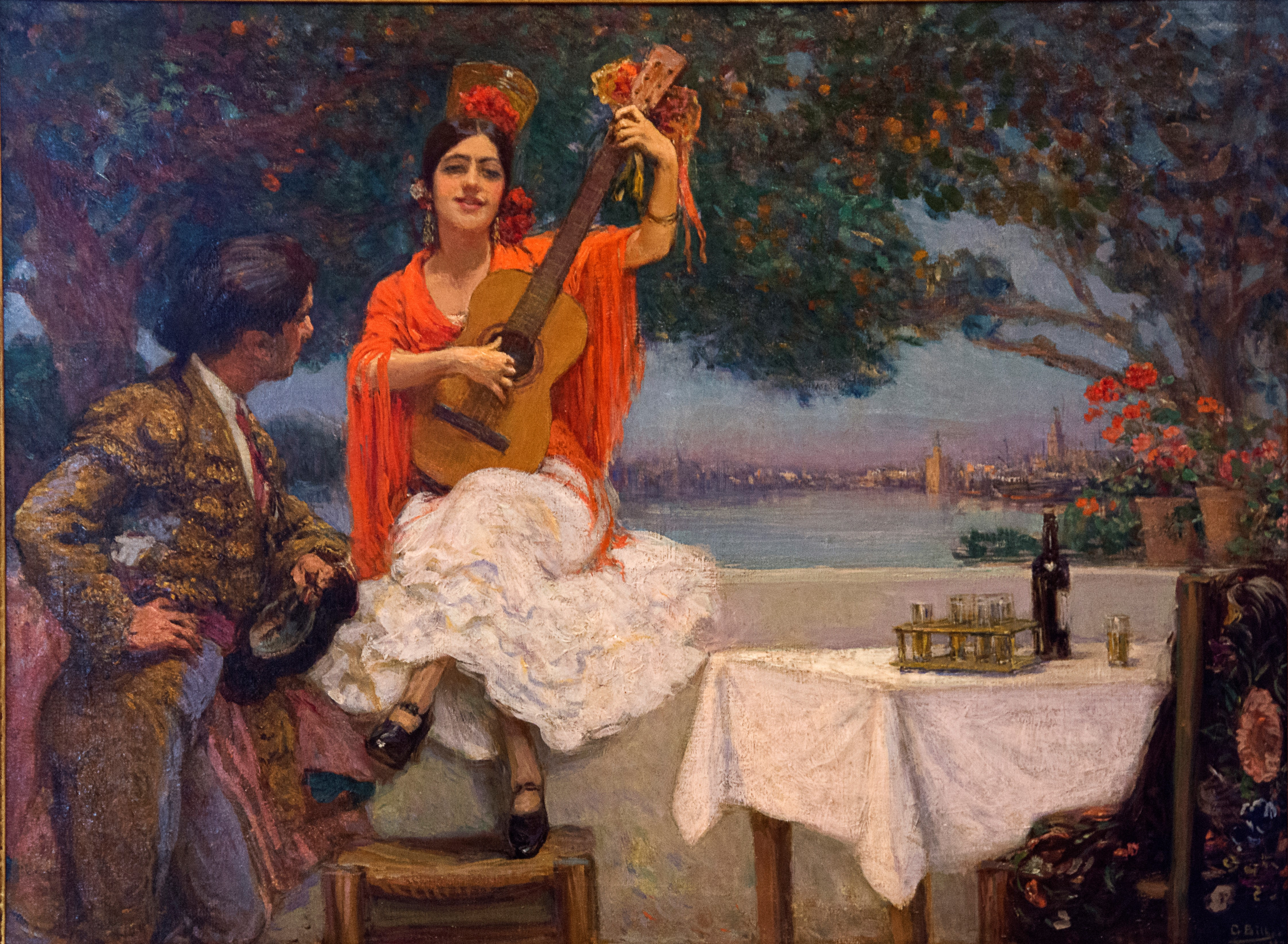 Cuadro Gitana y torero con el Guadalquivir al fondo de Gonzalo Bilbao. Museo Bellver, Sevilla.